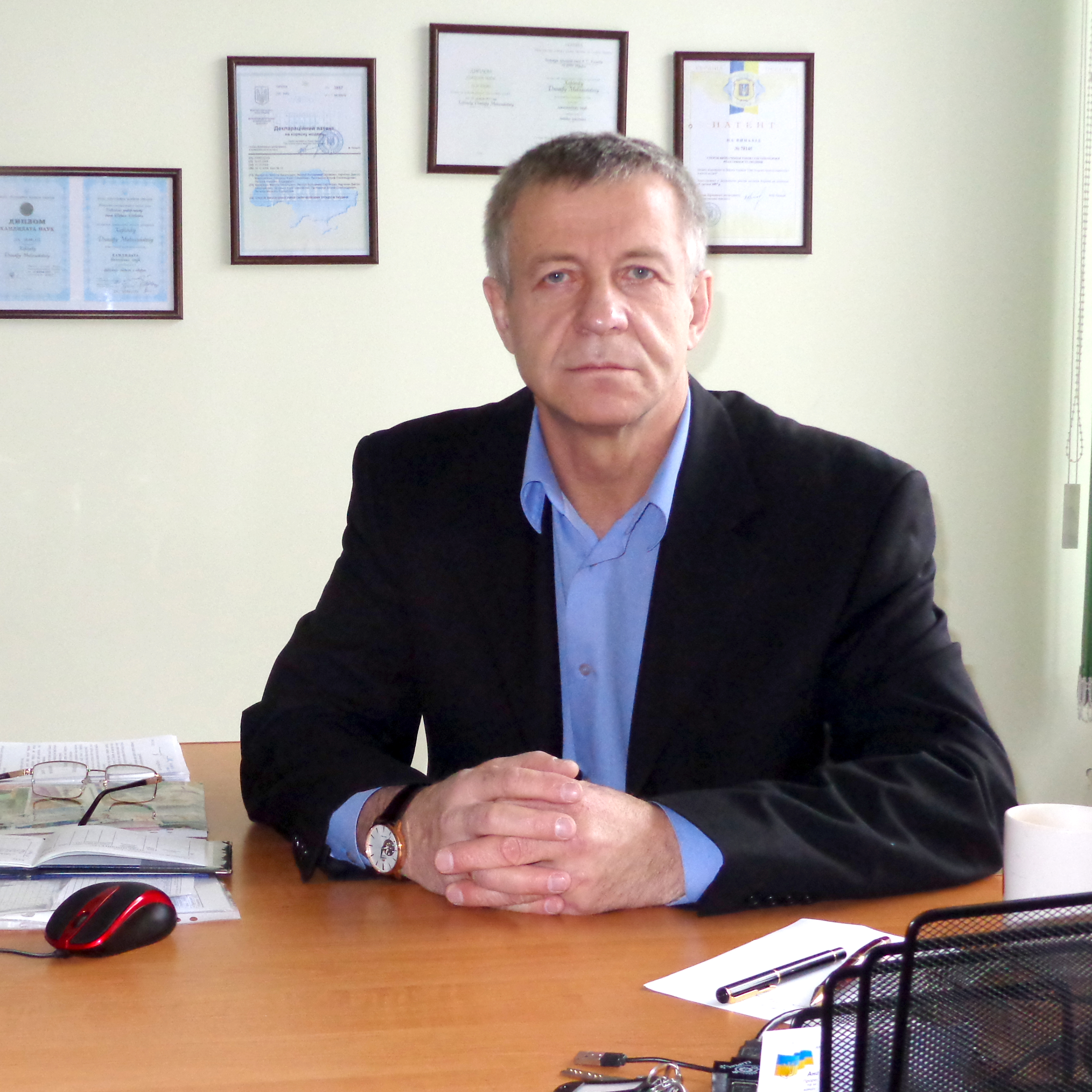 професор Харченко Д.М. на робочому місці - в лабораторії психодіагностики та медичної психології